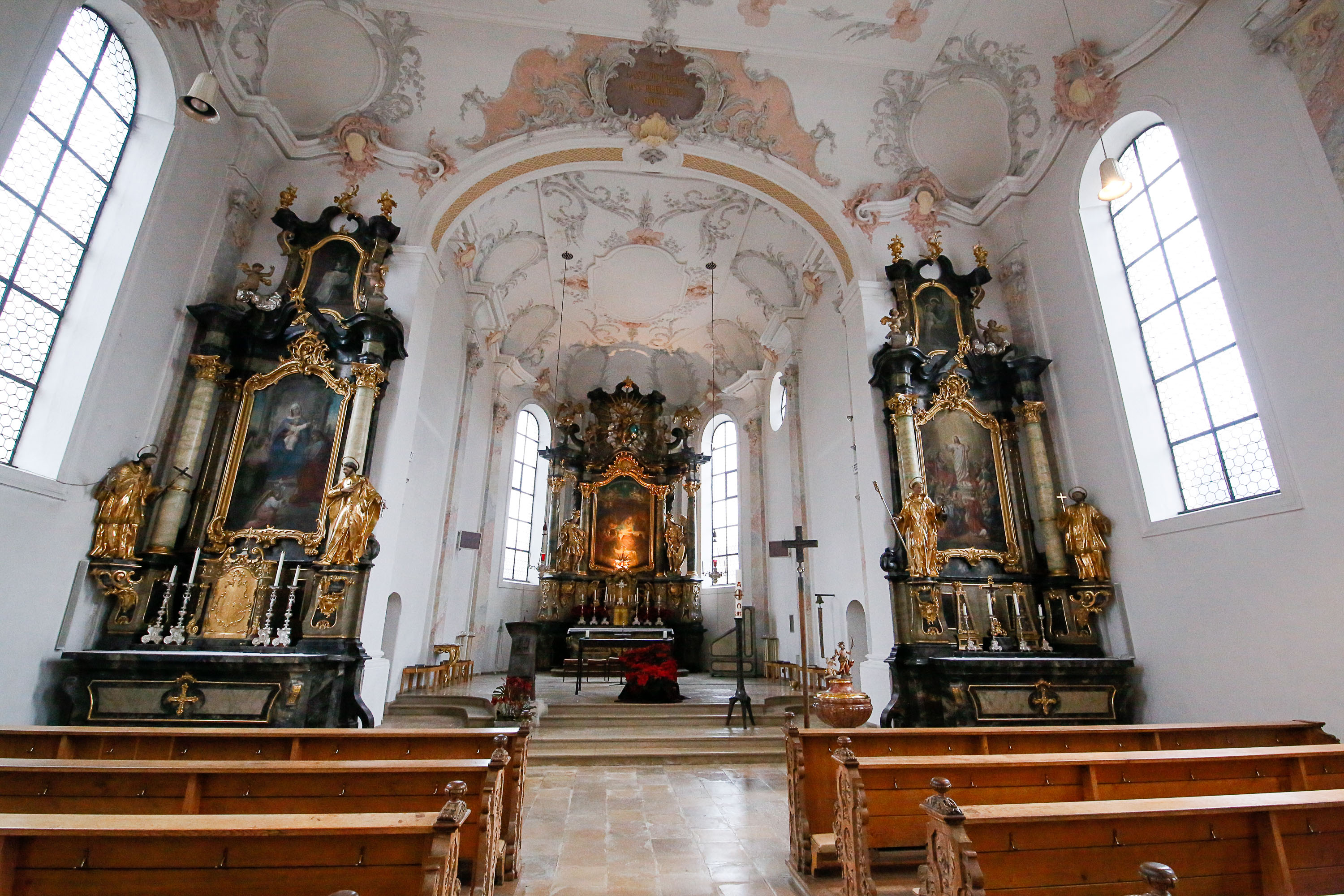 Kirche St. Georg und Michael, Augsburg. Altarraum.